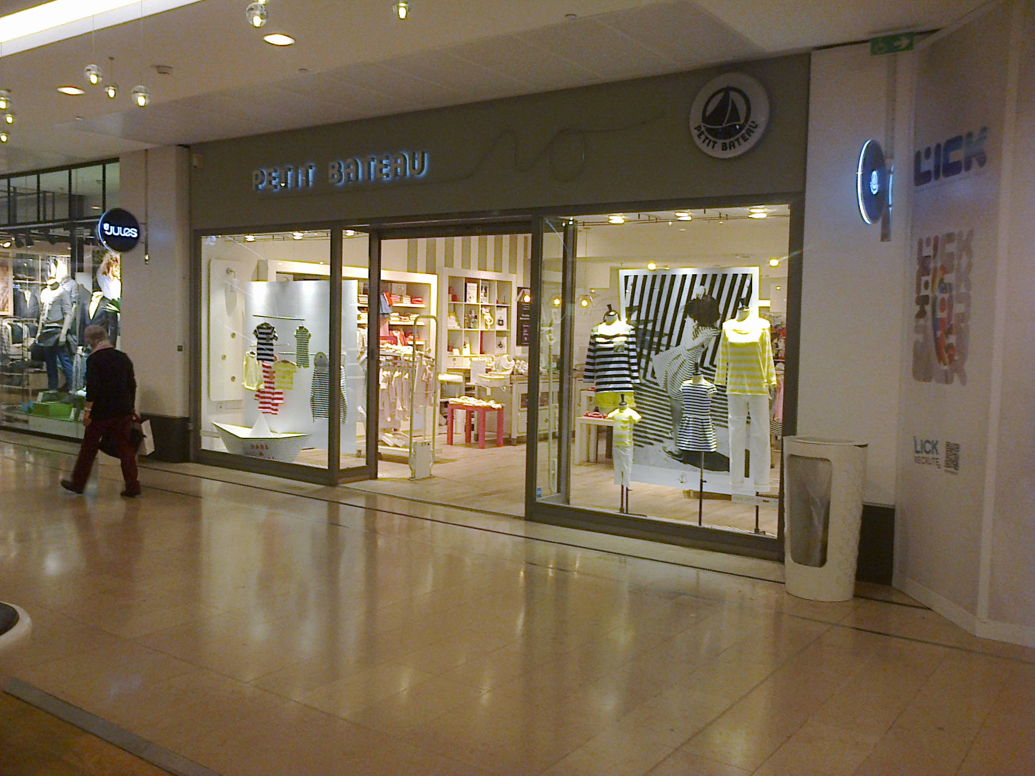 Boutique "Petit Bateau" au centre commercial "Les Quatre Temps" à La Défense